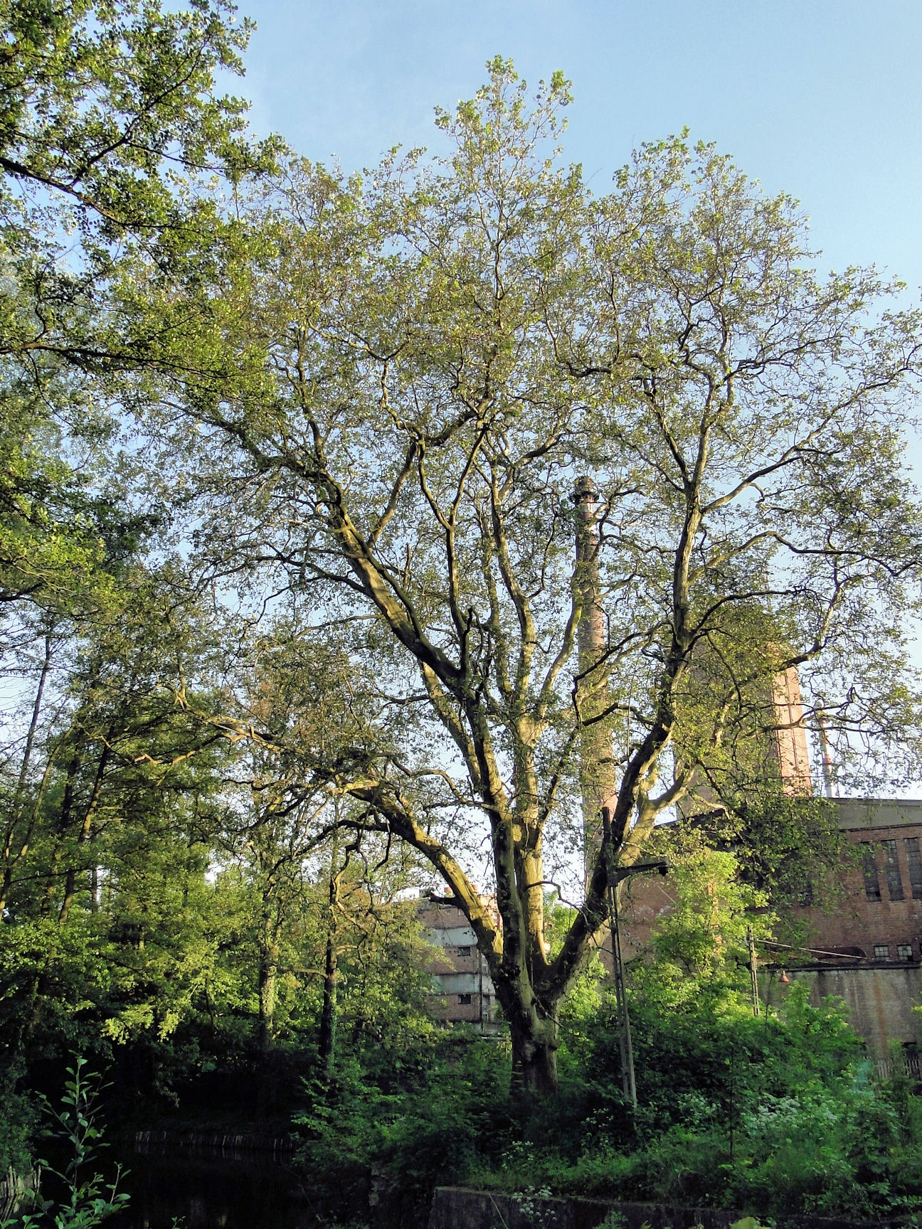 Lipa Anastazja w Szczecinie Strudze